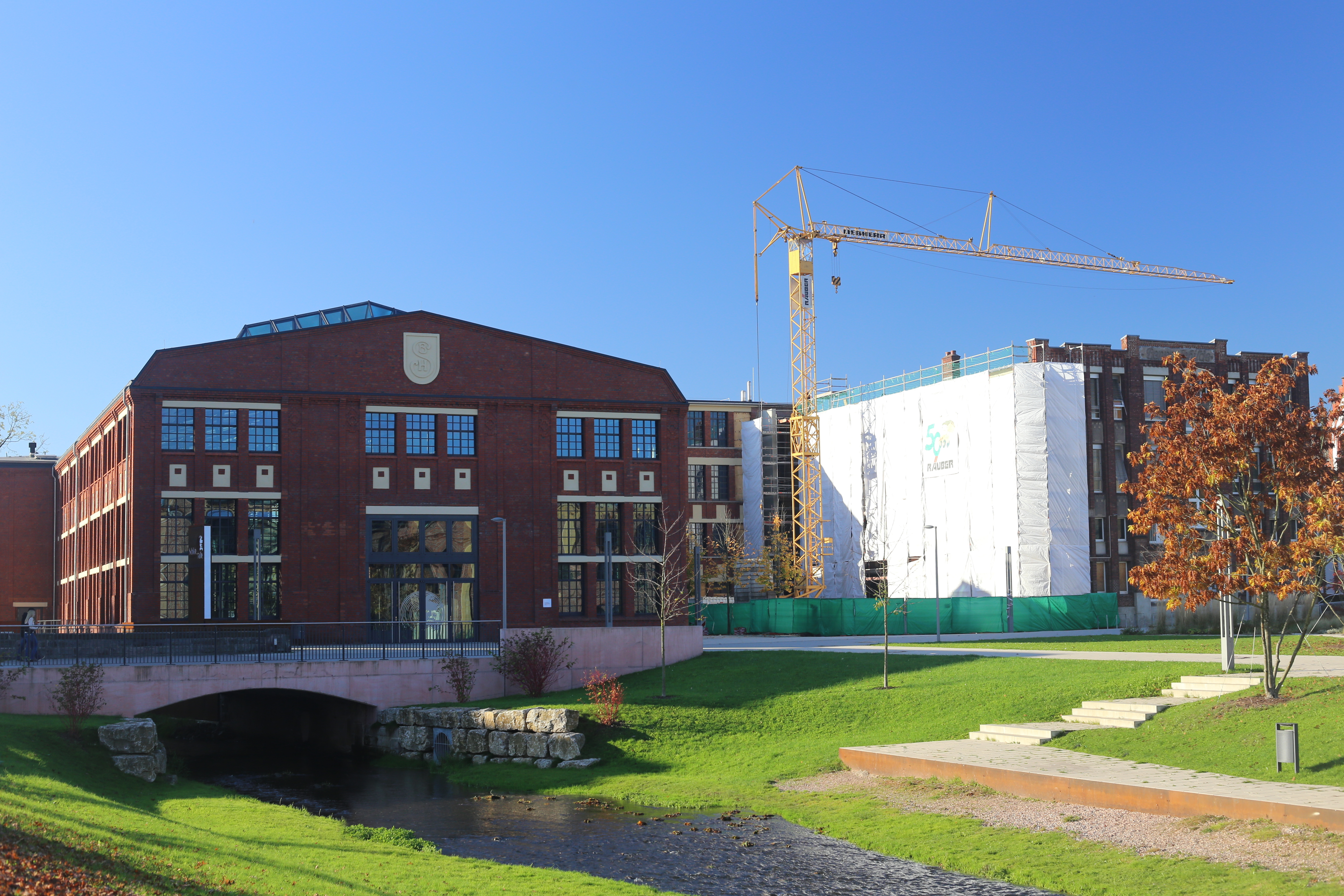 Aufnahme der unter industriellem Denkmalschutz stehenden Stockwerkshalle der ehemaligen Firma Schilde, im Schilde-Park in Bad Hersfeld.